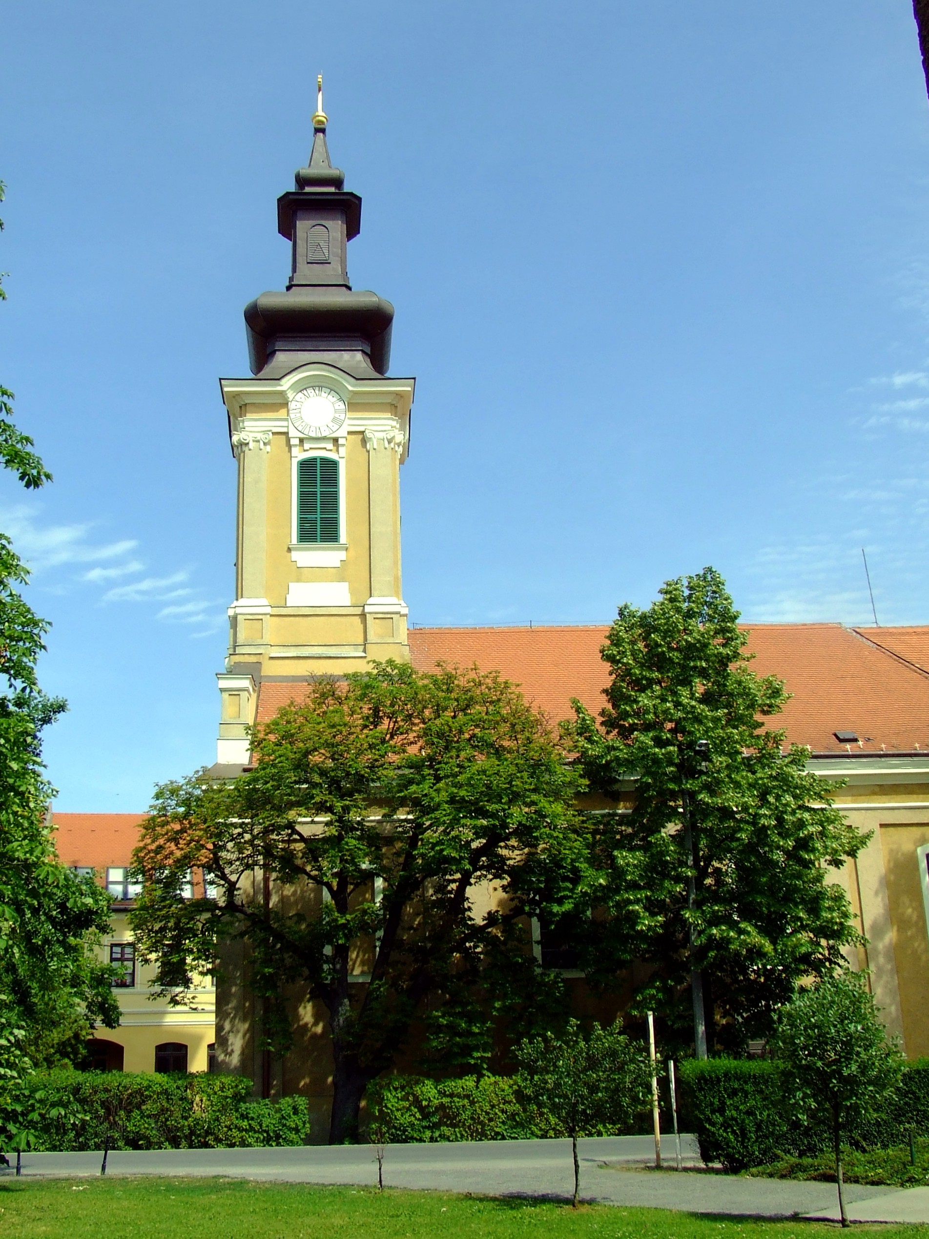 A ráckevei Keresztelő Szent János-templom